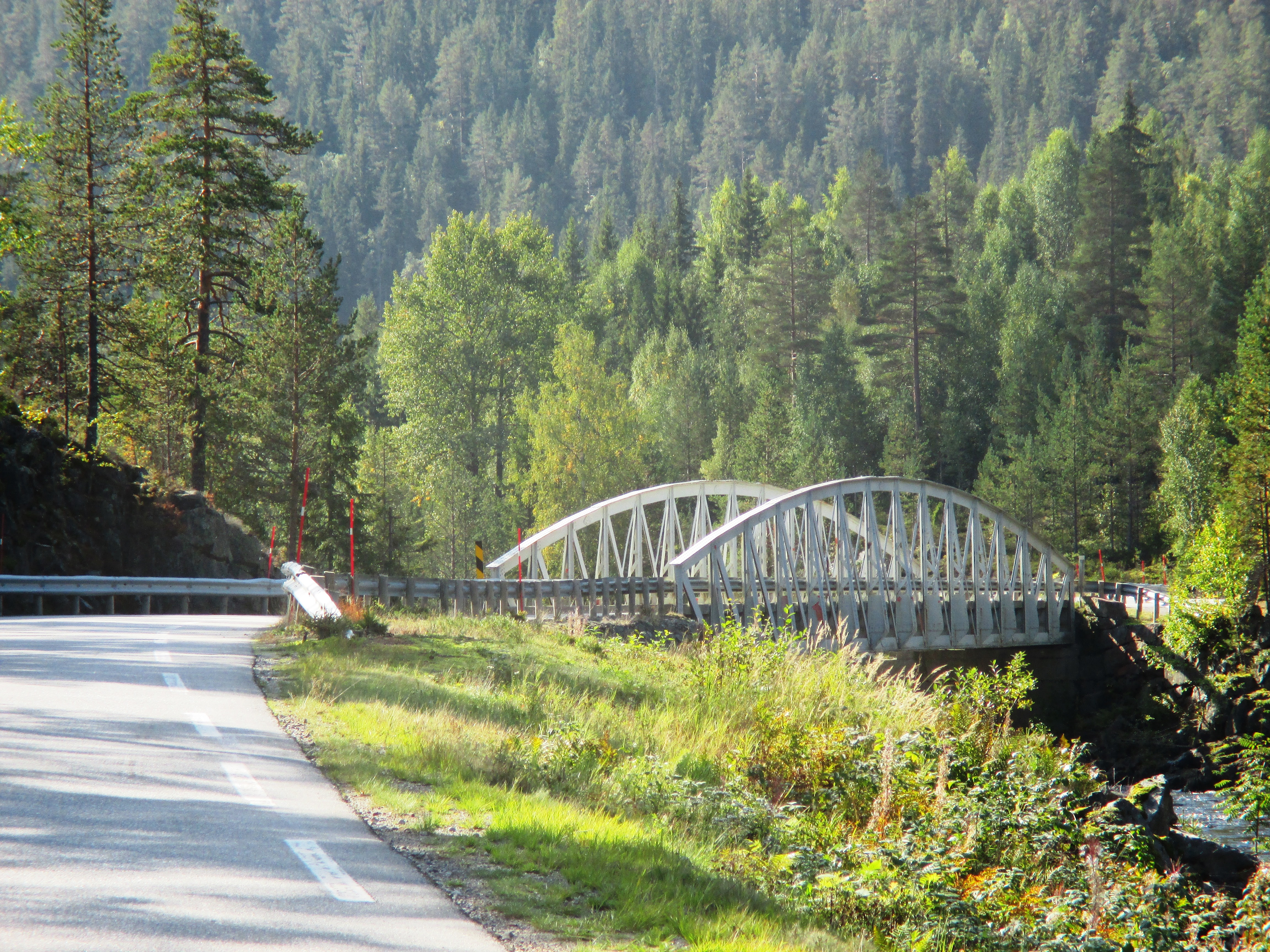 Tuddalsvegen (FV651) krysser Skogsåi.